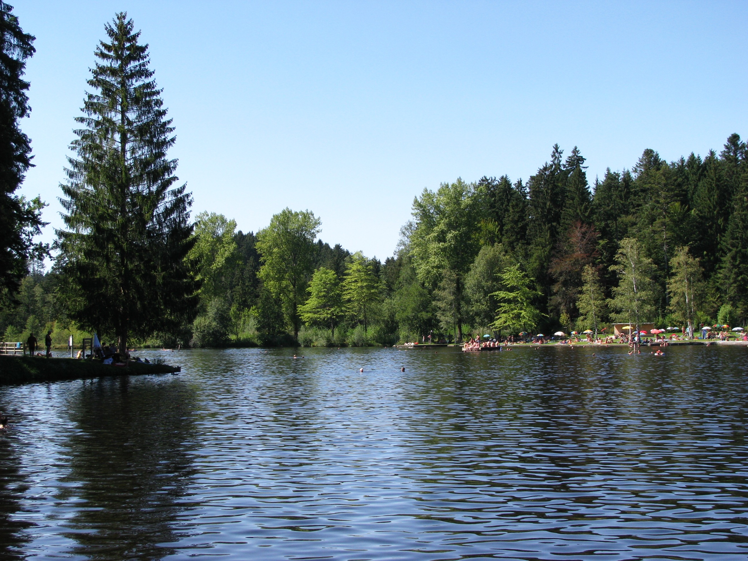 Waldsee in Lindenberg im Allgäu aus östlicher Richtung